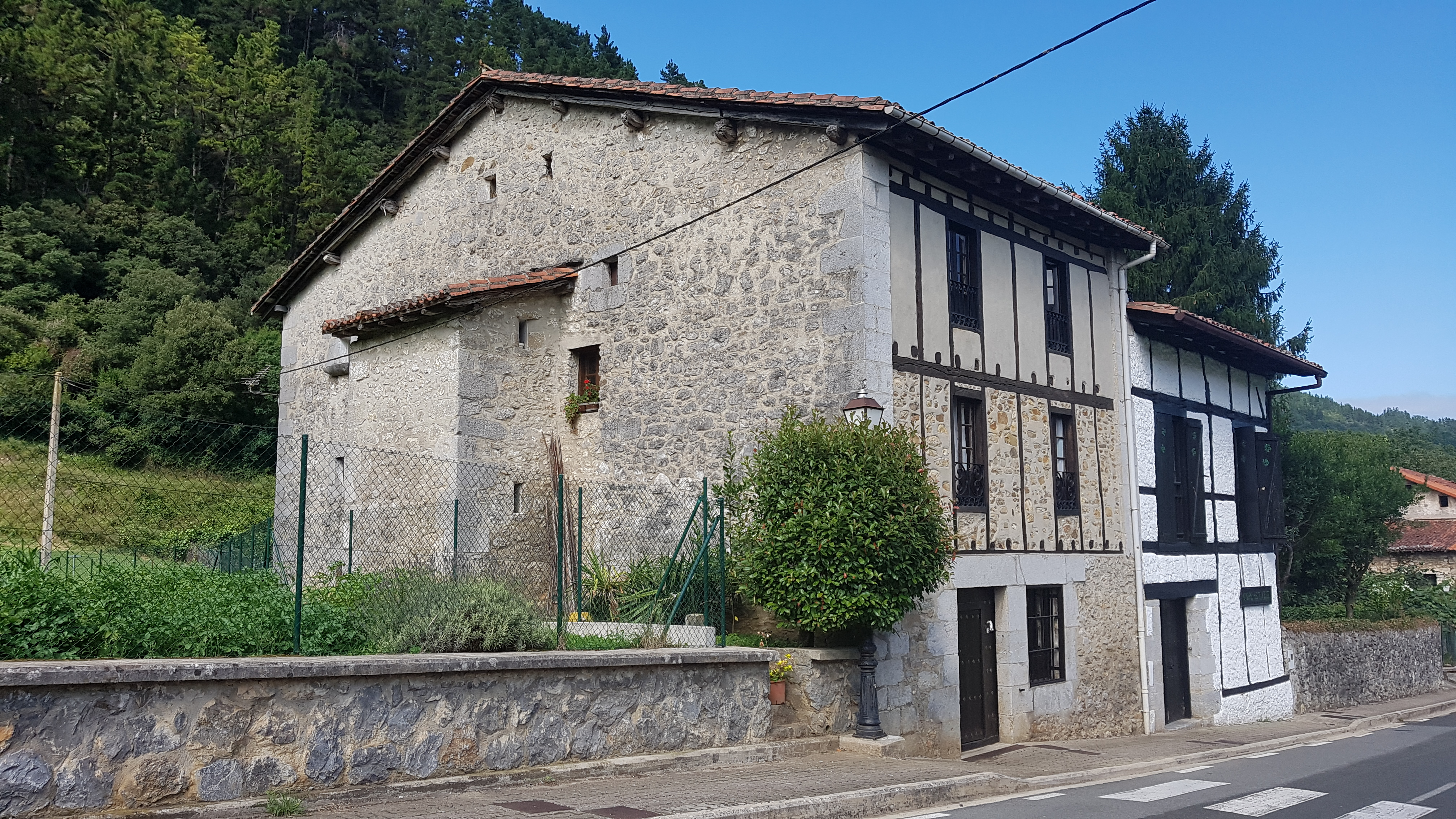 Hospital Zar etxea (Albiztur)